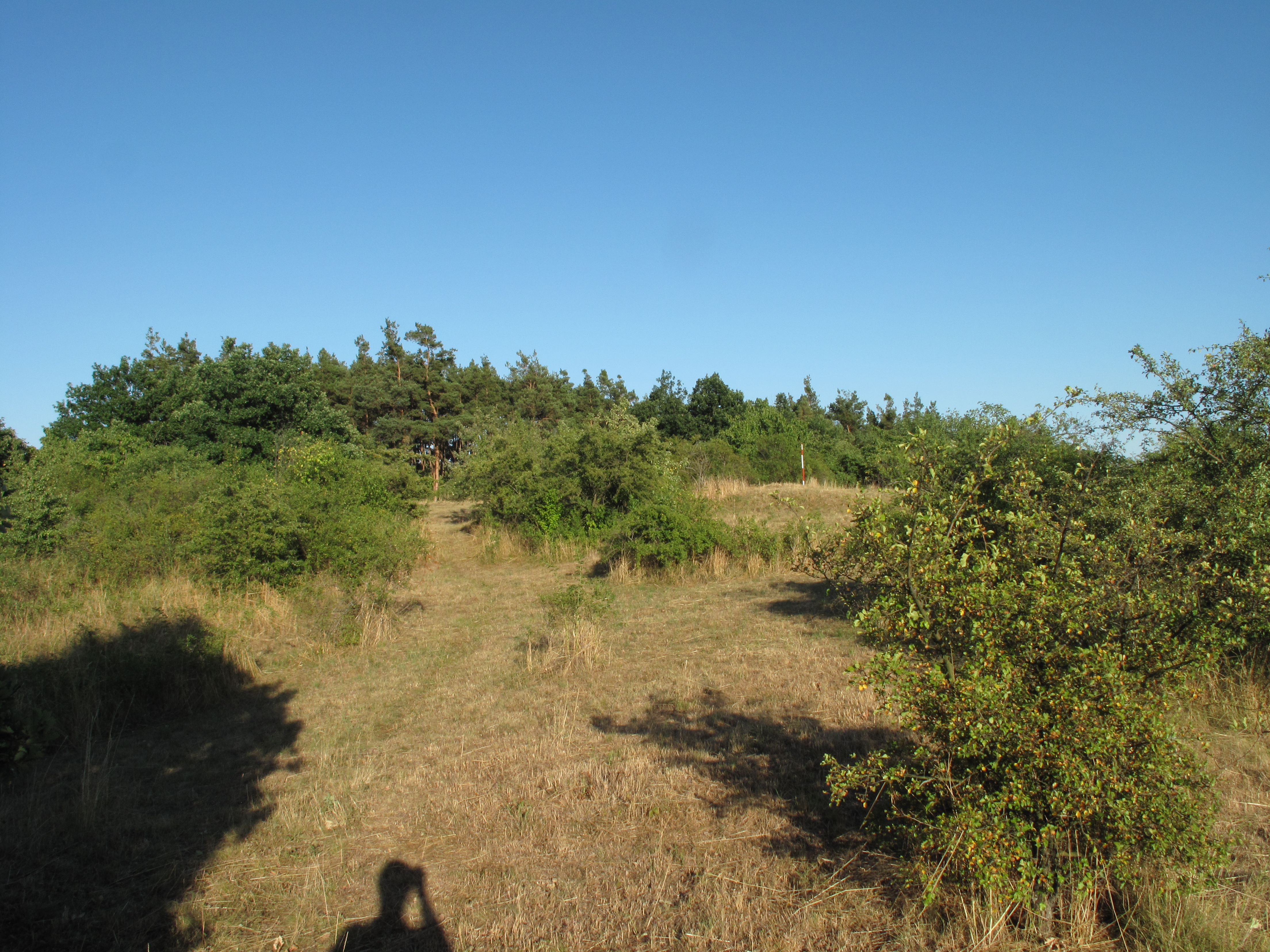 Přírodní památka Žebětín. Okres Brno-venkov, Česká republika.